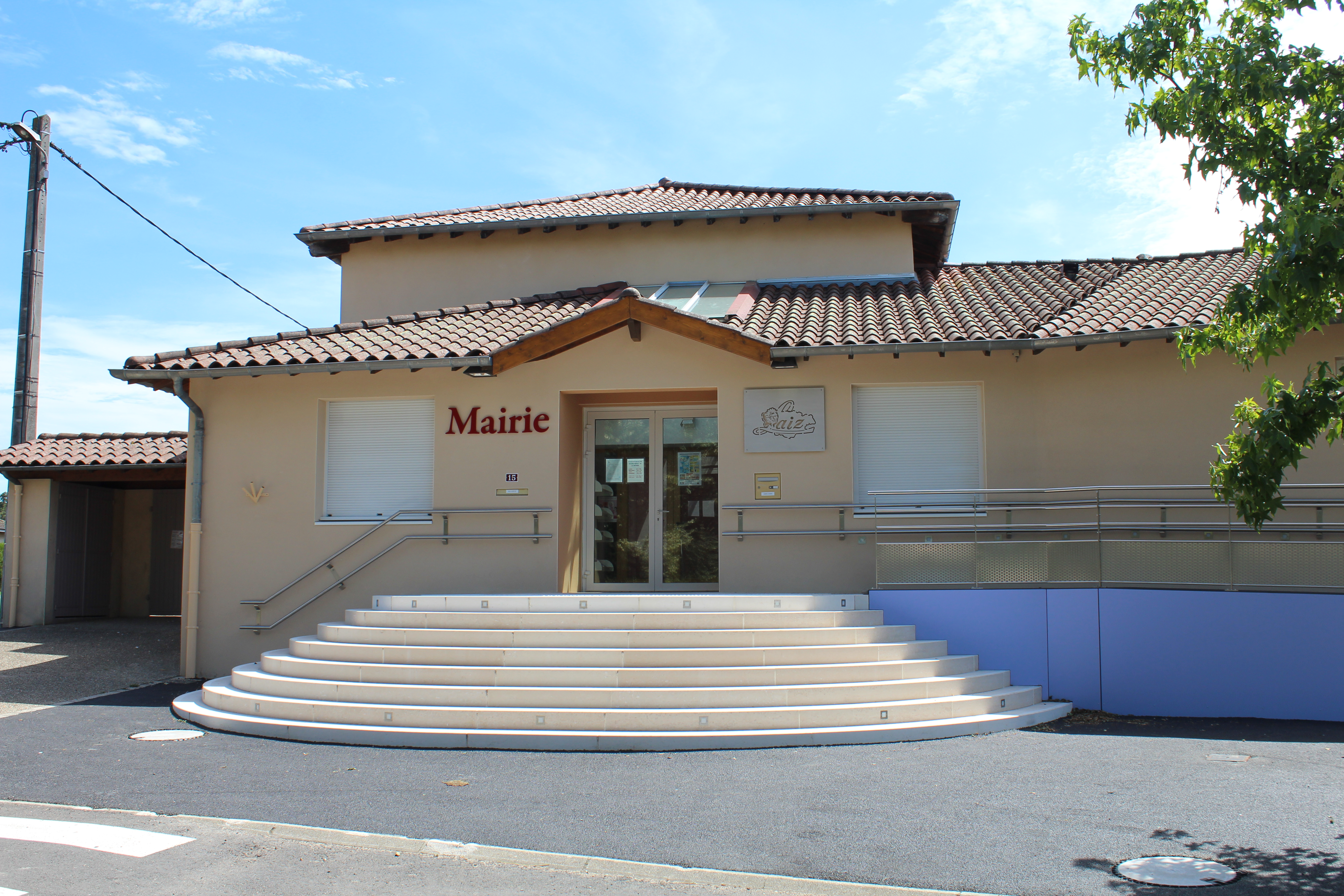 Mairie de la commune de Laiz.